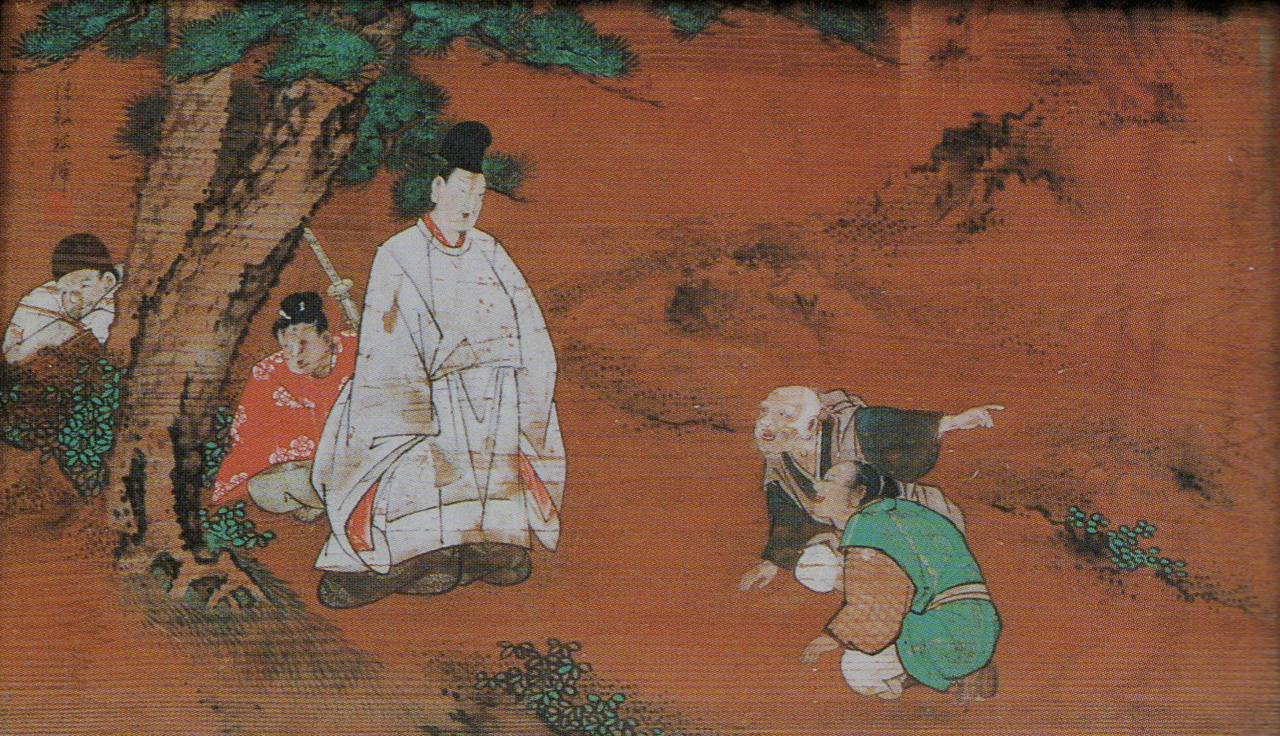 花山院忠長が描かれた絵馬。